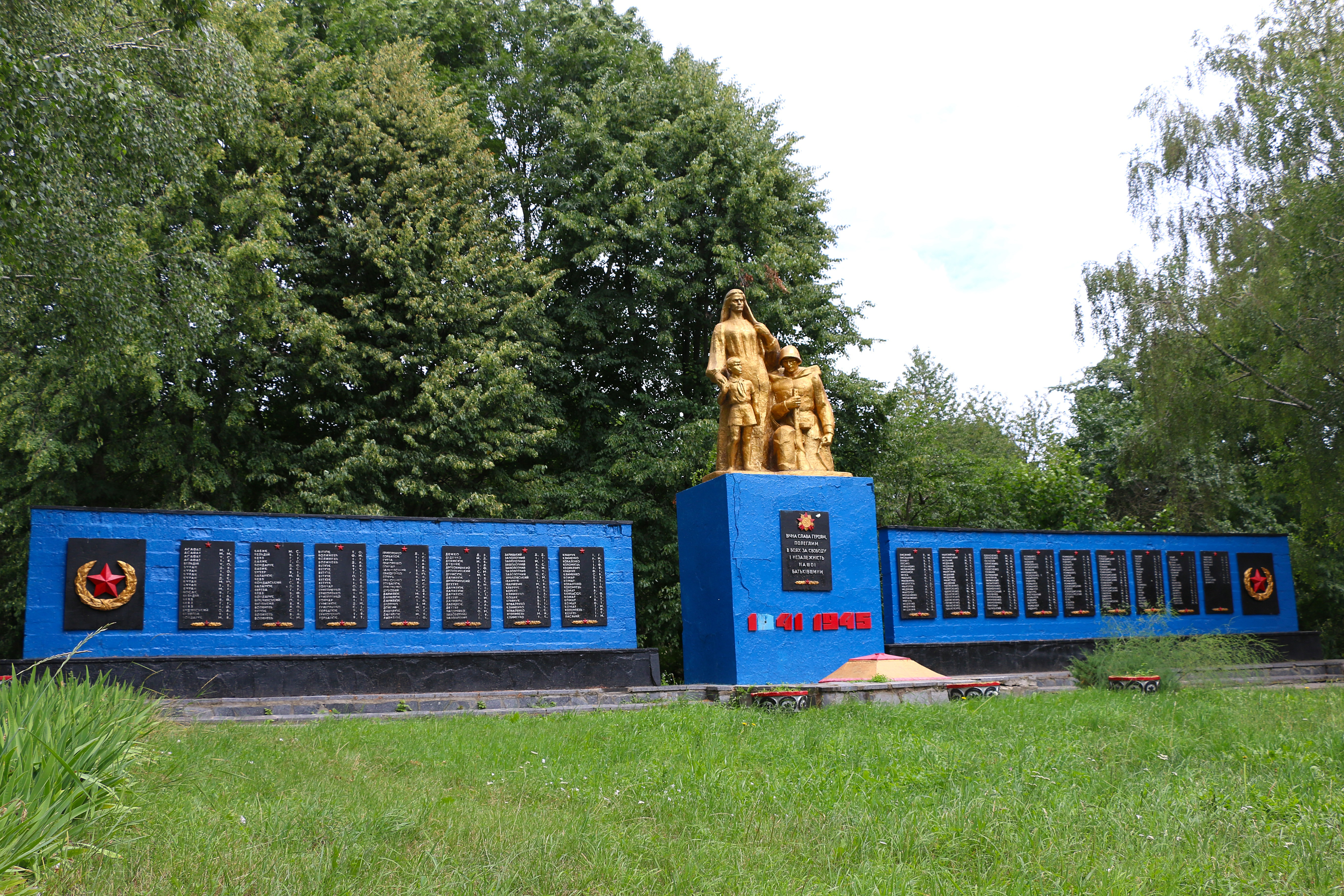 Пам'ятник 310 воїнам-односельчанам, загиблим на фронтах Великої Вітчизняної війни, Дашківці, в центрі села